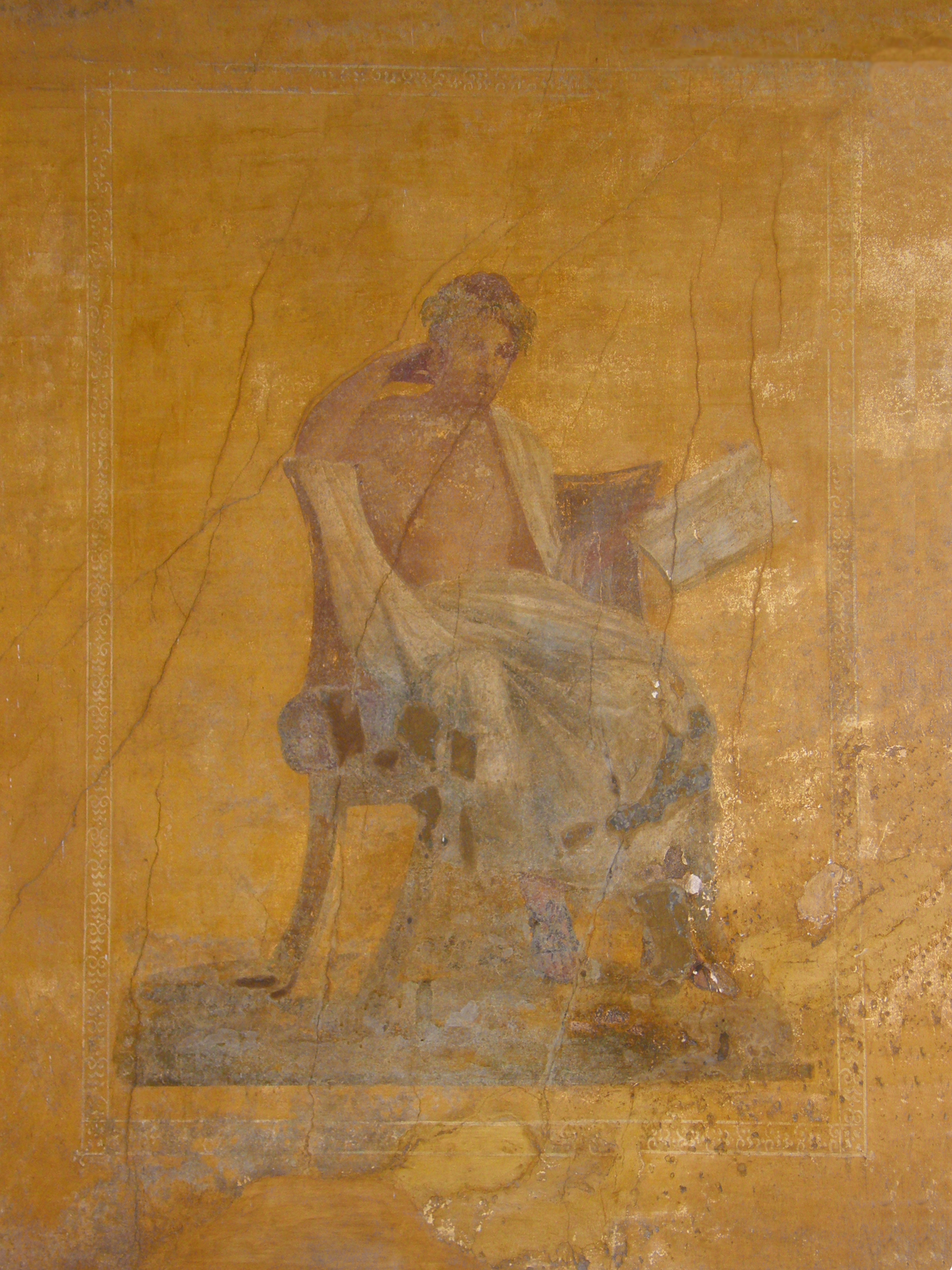 Affresco rappresentante Menandro - Fresco depicting Menander